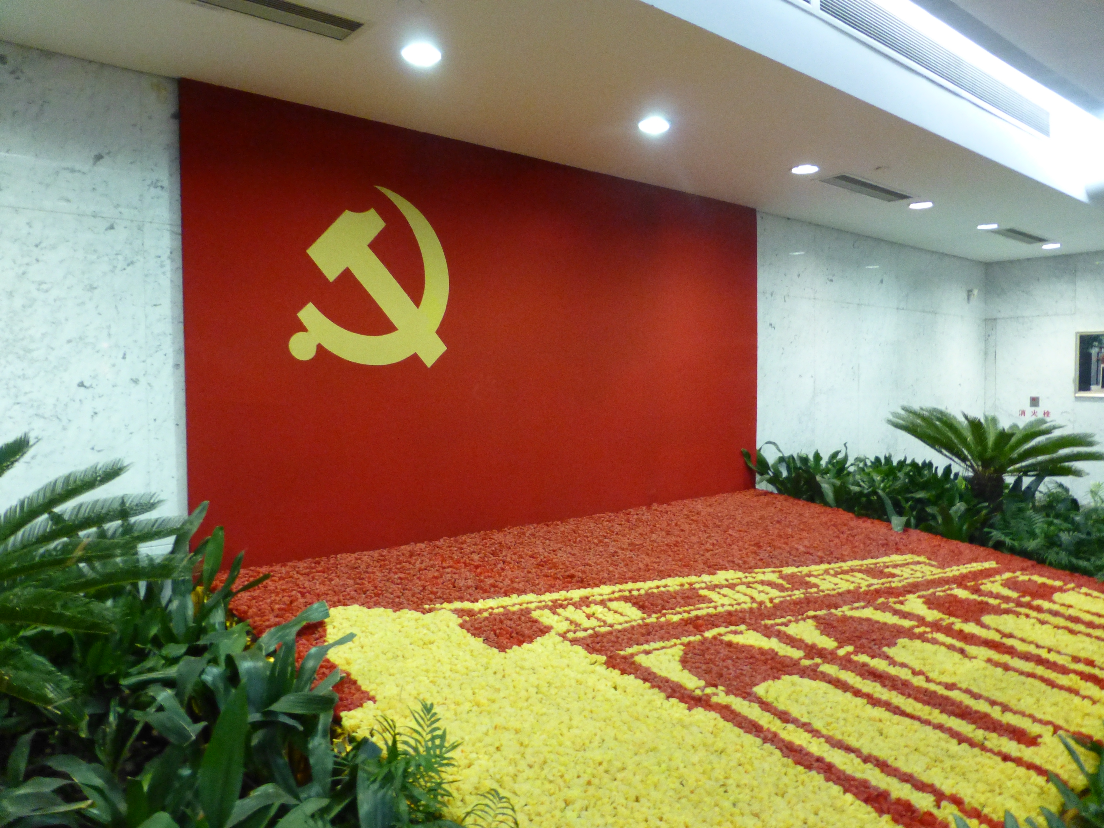 Arreglo floral y bandera, en la sede donde se desarrolló el Primer Congreso del Partido Comunista de China, Shanghai, China.